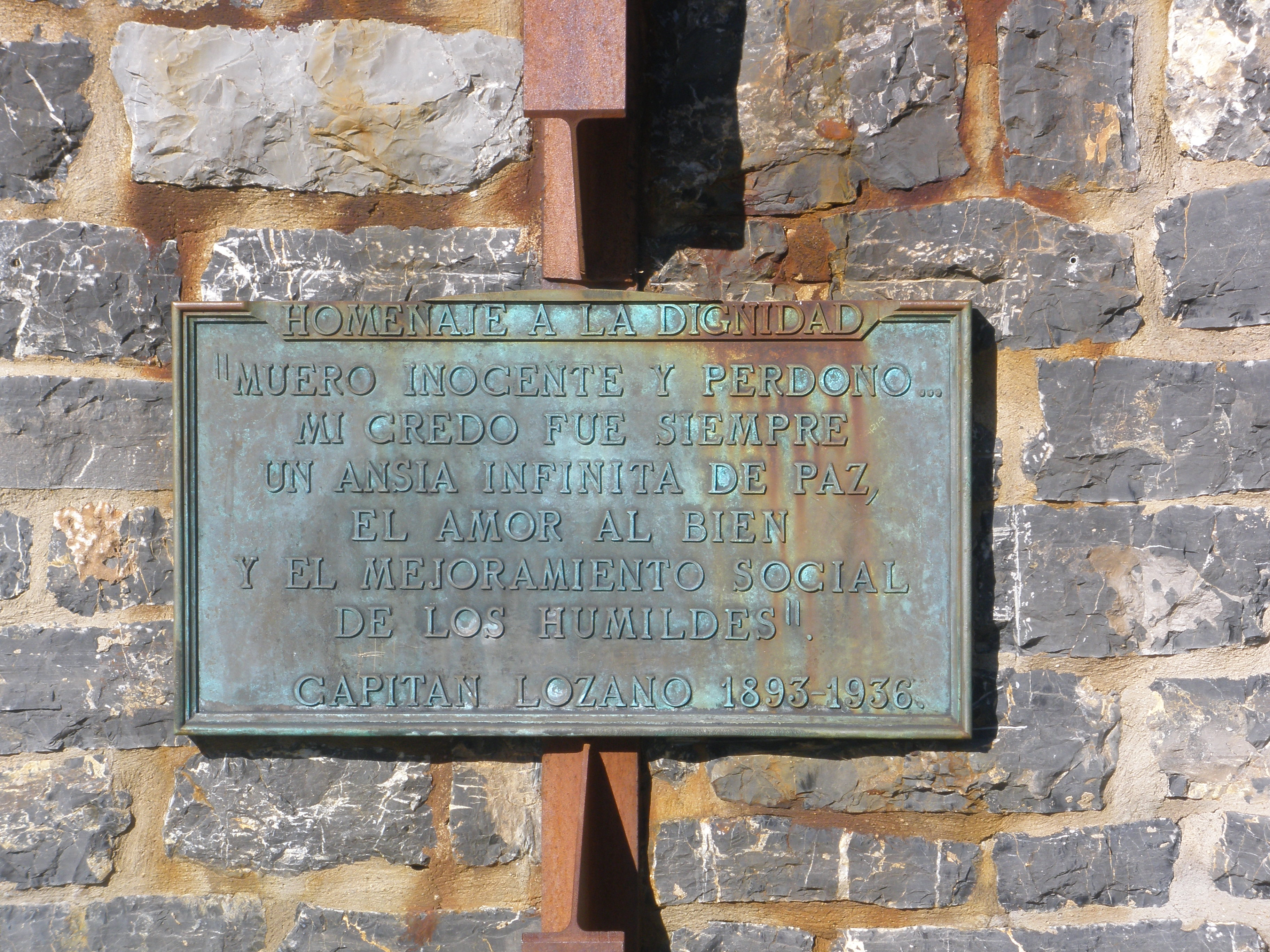 Detalle de la inscripción en el monumento en honor del capitán Lozano, en el alto de Aralla, Sena de Luna, junto a los restos de una trinchera de la Guerra Civil en la que se le recordaba (agosto de 2012): "Muero inocente y perdono... Mi credo fue siempre un infinita ansia de paz, el amor al bien y el mejoramiento social de los humildes."